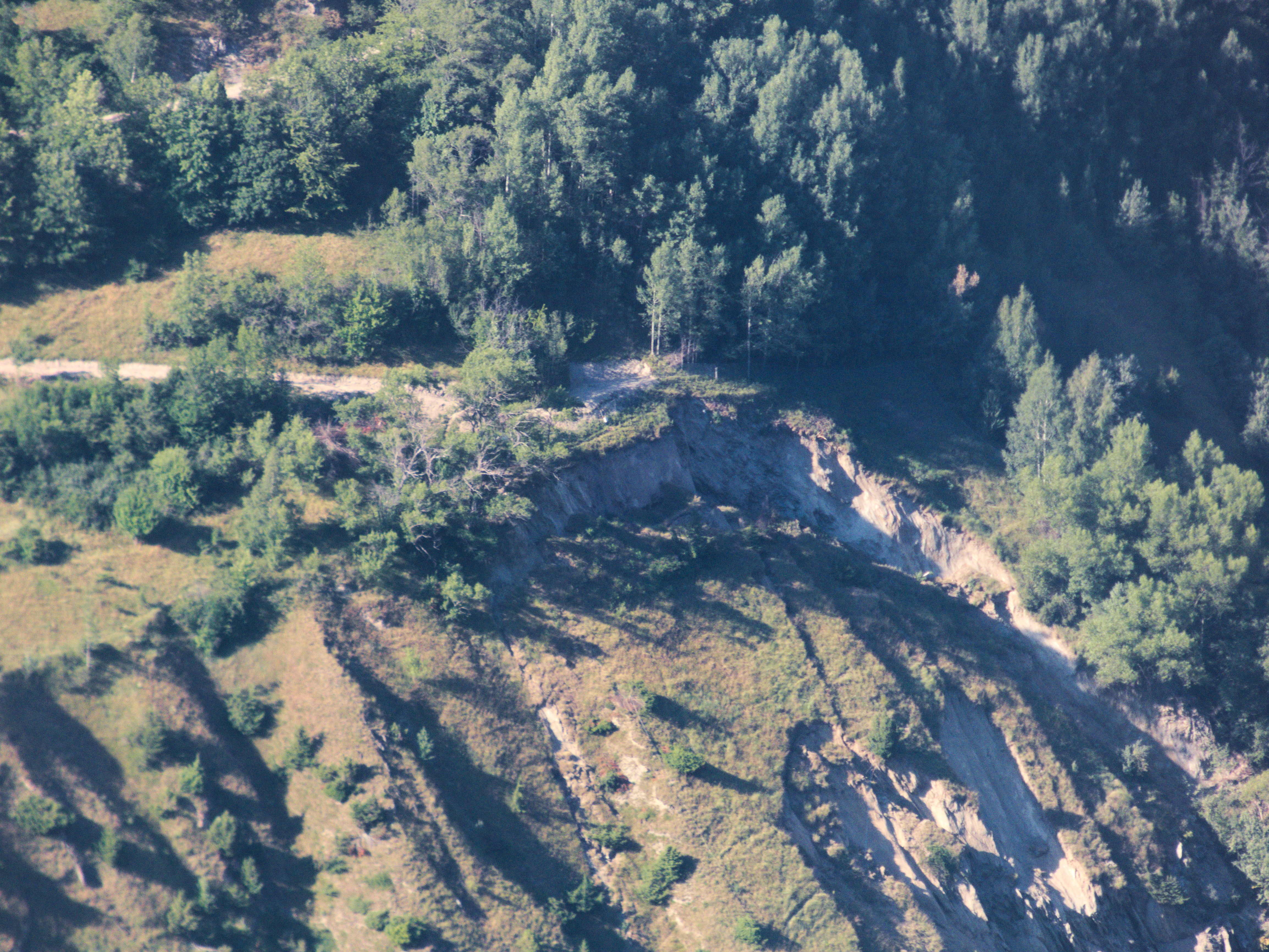 Glissement de terrain du tunnel du Chambon, fissure sommitale, au 12 juillet 2015; hauteur de décrochement estimée 10m, longueur 100m